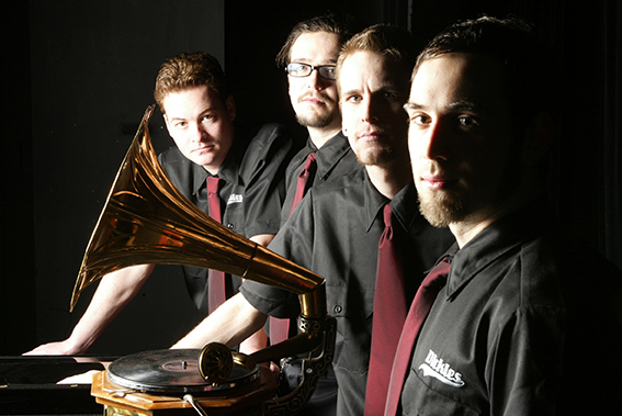 Pyogenesis 2002